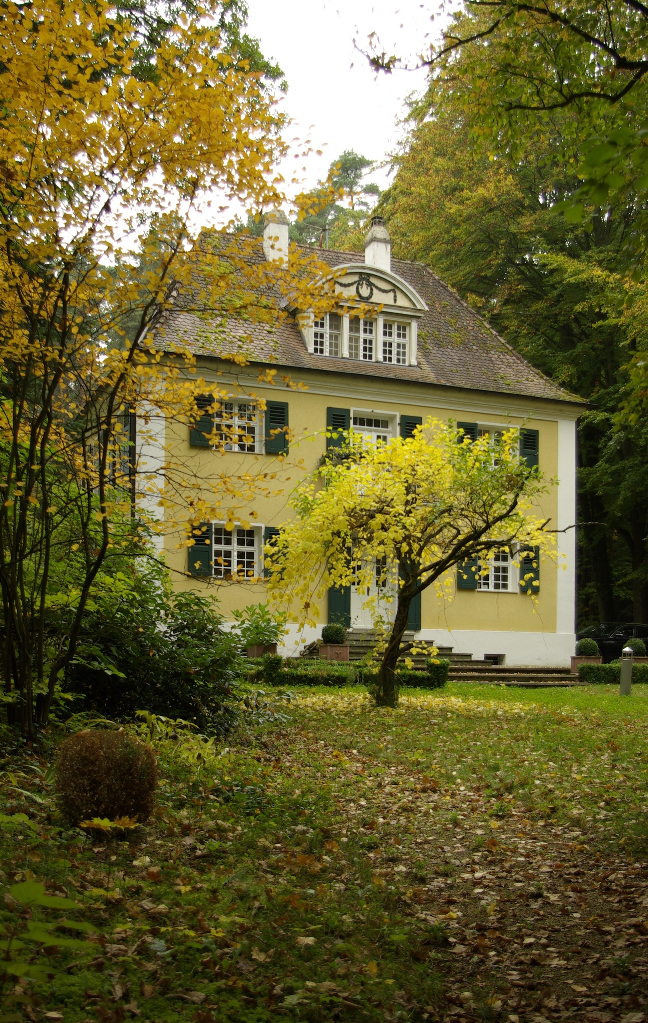 Jagd- und Landhaus Baimbacher Straße 4 im Schwabacher Ortsteil Wolkersdorf.